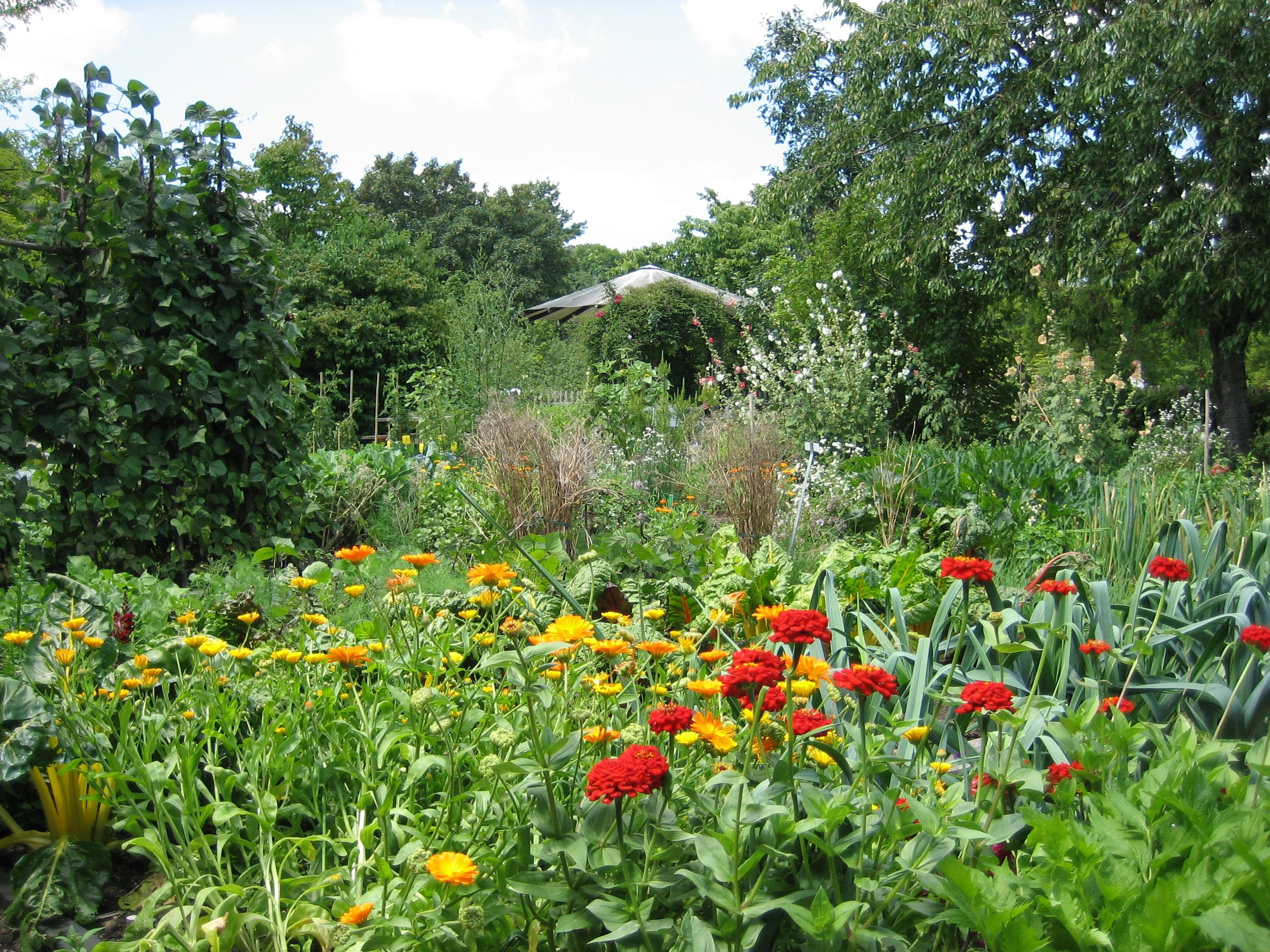 Botanischer Garten in Augsburg, im ökologisch gestalteten (Natur-)Garten